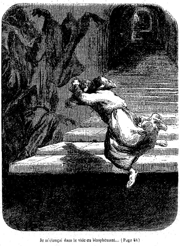 Illustrations de Tony Johannot et Maurice Sand pour le roman "Spiridion" de George Sand, dans sa réédition incluse dans les "Œuvres illustrées de George Sand" parues à Paris chez Hetzel, volume 9, 1856. Illustration figurant en page 41. (Attention : dans les volumes des "Œuvres illustrées de George Sand", la pagination recommence à 1 au début de chaque texte inclus dans un volume.)